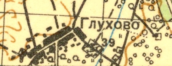 Топографическая карта Ленинградской области, квадрат О-35-12-Г (Ропша), деревня Глухово